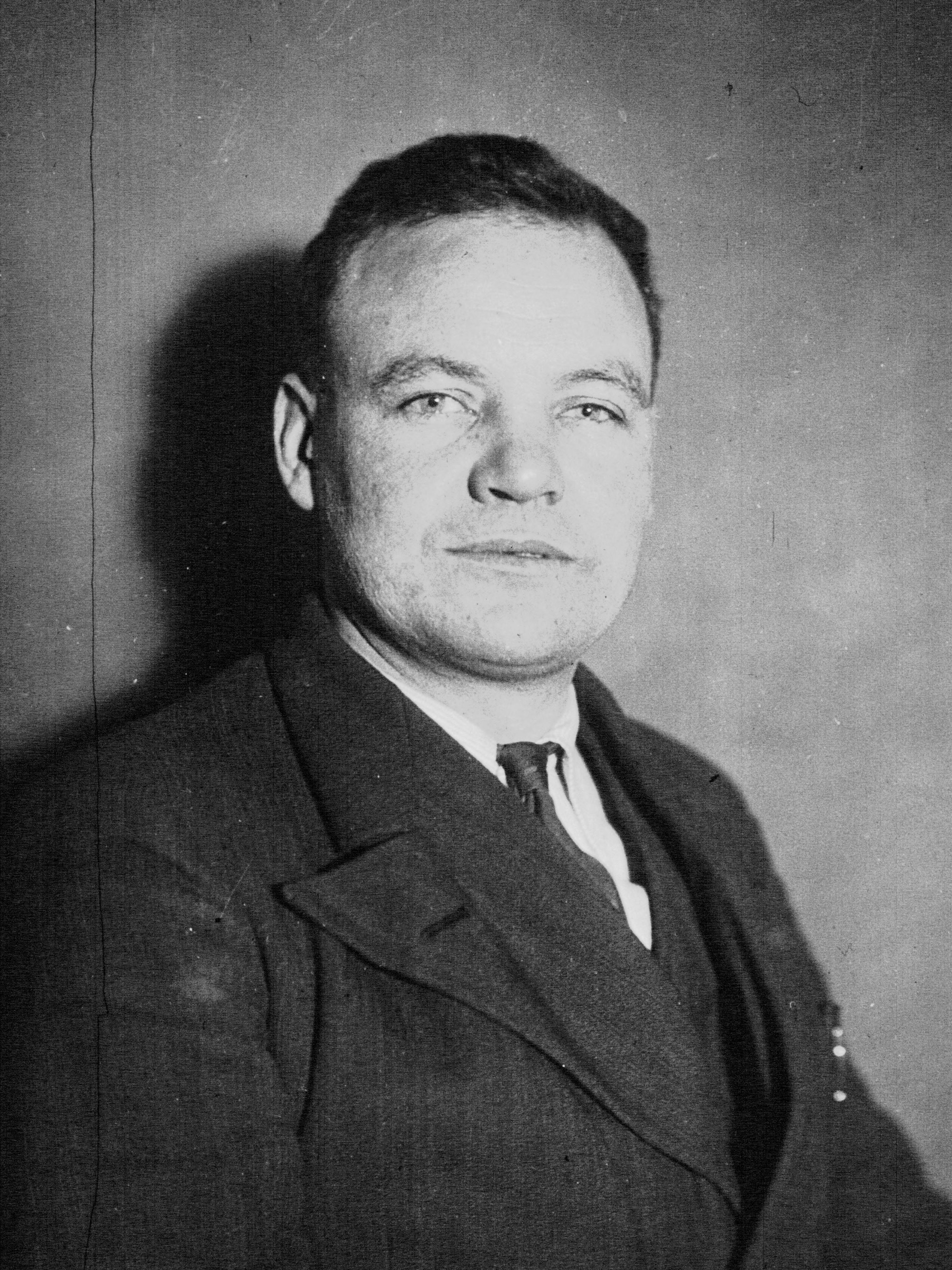 Maurice Thorez, député (Seine) [photographie de presse]